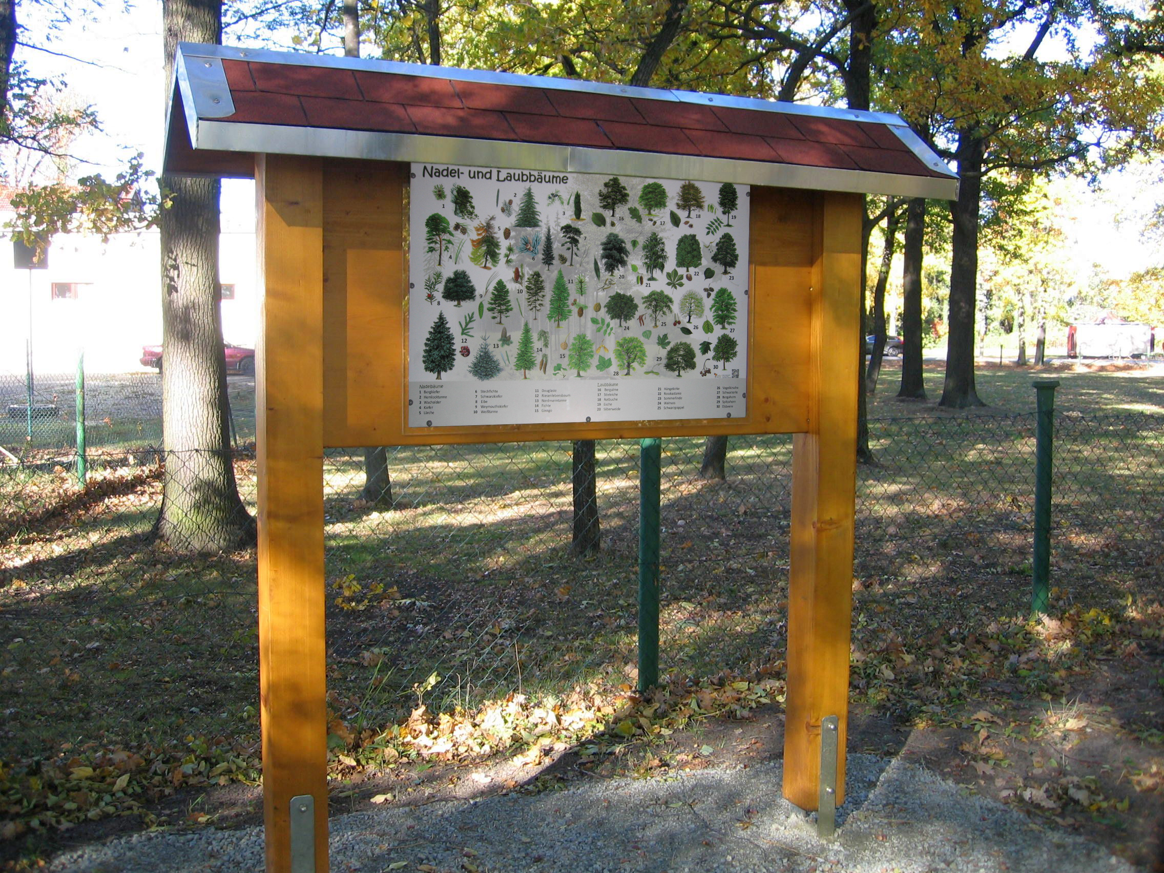 Geschwister-Scholl-Weg Ruhland, Informationstafel Nadel- und Laubbäume, südliche Ansicht; diese Informationstafel steht nordöstlich des Sportplatz-Nebengebäudes; 2018 aufgestellt vom Verein für Heimatpflege